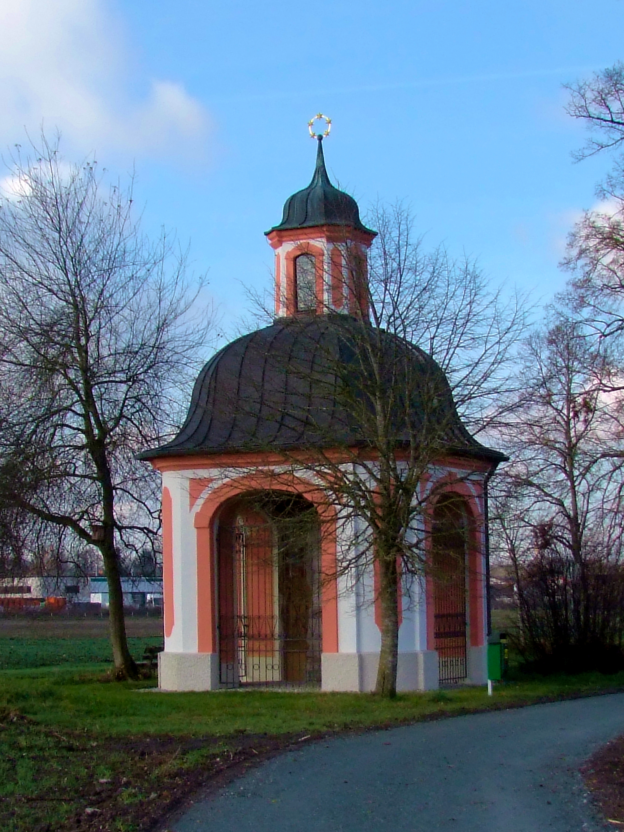 Johann Nepomuk Kapelle, erbaut 1738, in Anning, Stadt Traunreut, am Ende einer ca. 700m langen Allee vom Schloß Stein an der Traun in südöstlicher Richtung